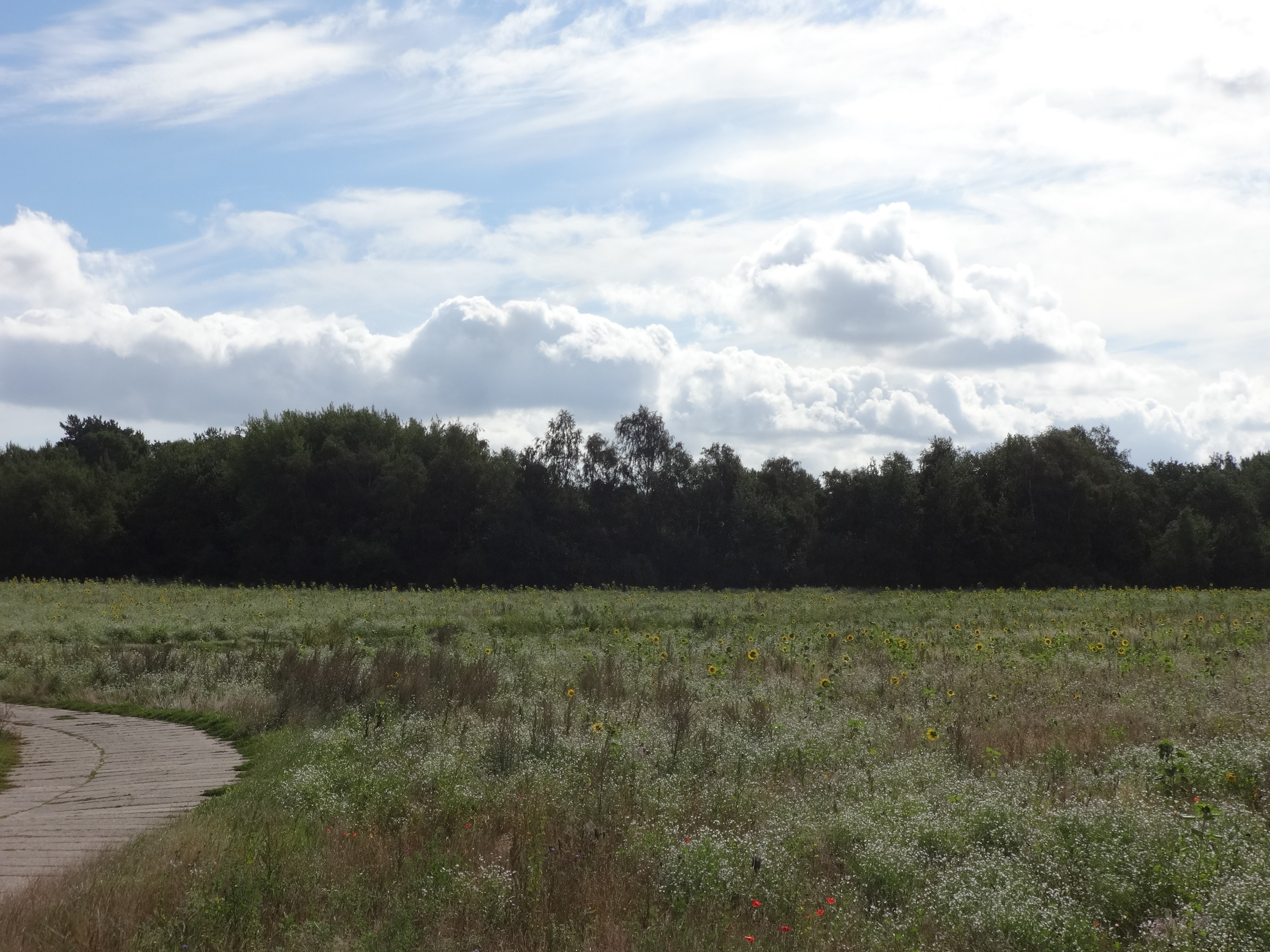 Blick von der Mannhäger Straße auf das NSG Mannhagener Moor